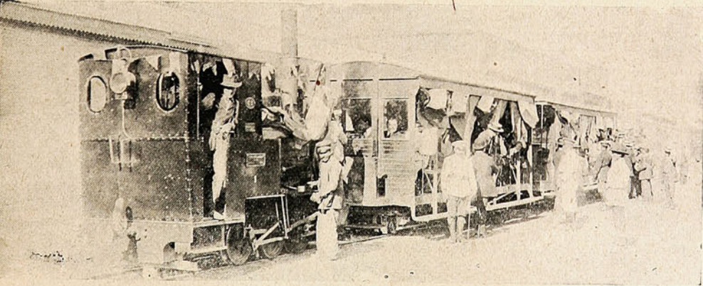 Inauguración del ferrocarril a vapor Yungay-Barrancas, 19 de enero de 1913. Lectura original de la foto: "El convoy antes de partir de Yungay al pueblo de Barrancas"